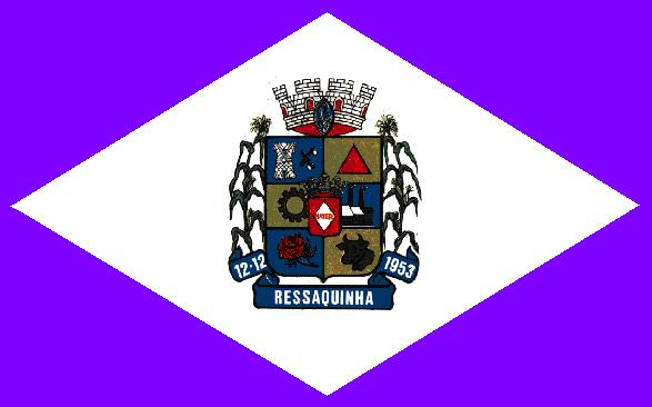 Bandeira do município de Ressaquinha, Minas Gerais, Brasil.